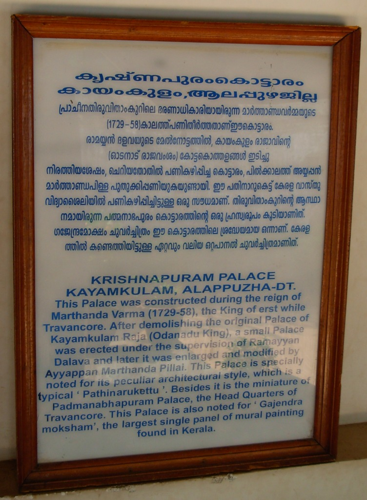 കൃഷ്ണപുരം കൊട്ടാരത്തിലെ പ്രവേശനകവാടത്തിനരുകിൽ പ്രദർശിപ്പിച്ചിട്ടുള്ള കൊട്ടാരത്തെപ്പറ്റിയുള്ള ചെറുവിവരണം